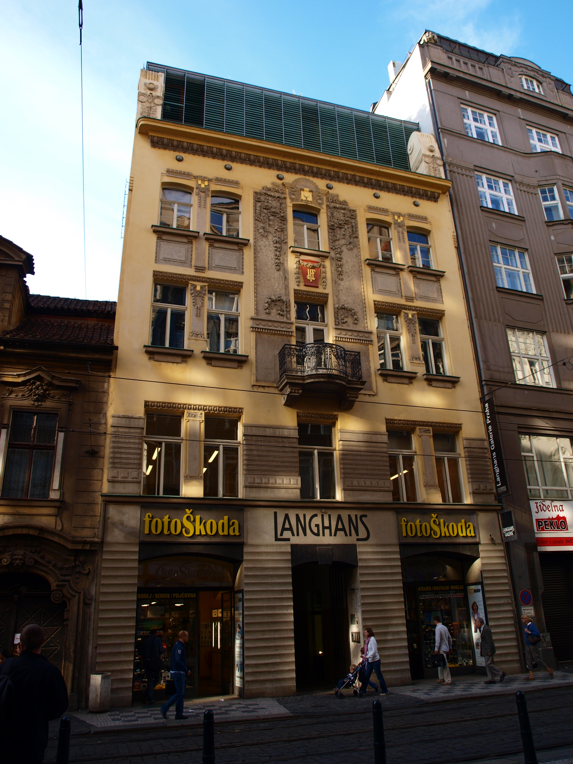 Palác Langhans, Praha